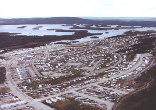 Photo de Gagnon en 1972